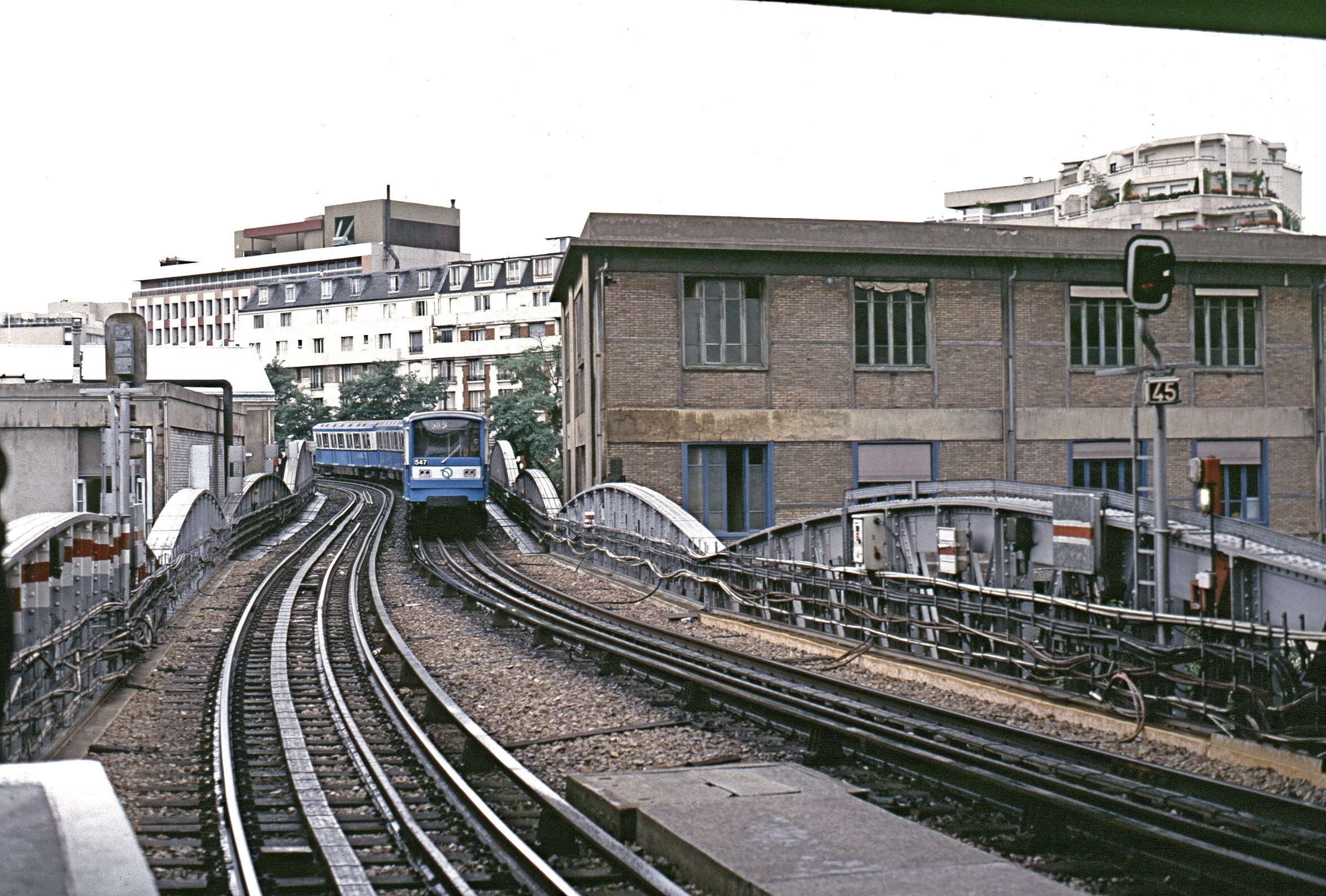 Rame MF 67 quittant la Gare d'Austerlitz